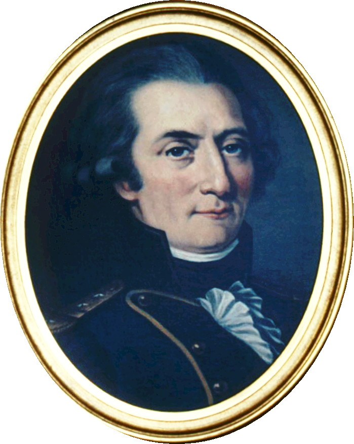 År 1782 blev Wijnbladh ägare till gårdarna Frösunda och Brahelund. Han byggde Charlottenburg 1801-02 som fick namnet efter Adolf Fredriks hustru Charlotte Arbin.